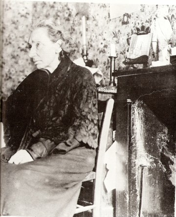 Louise Michel na senioridade, cerca de 1904.